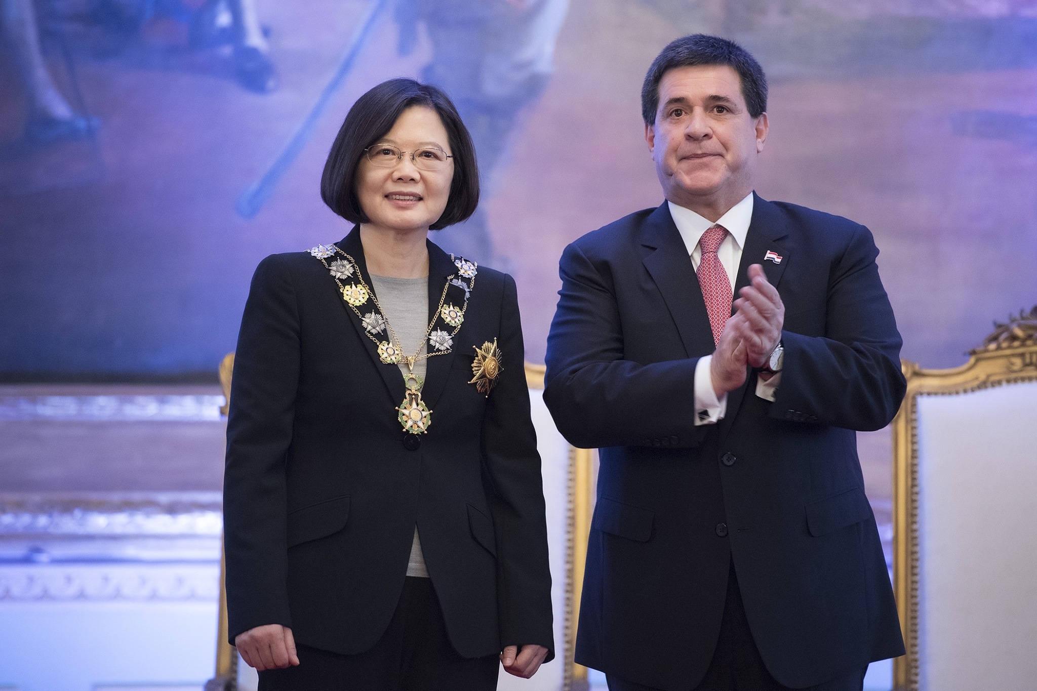 President Tsai receives the Marshal Francisco Solano Lopez Honor Medal from Paraguay President Horacio Cartes. (2016/06/28) La Presidenta Tsai recibe la condecoración de la “Orden Nacional del Mérito en el Grado de Collar Mariscal Francisco Solano López” de manos del Presidente del Paraguay, Horacio Cartes. (2016/06/28) 授權方式及範圍：中華民國總統府│政府網站資料開放宣告 Authorization Method & Scope: Office of the President, Republic of China (Taiwan) | Government Website Open Information Announcement